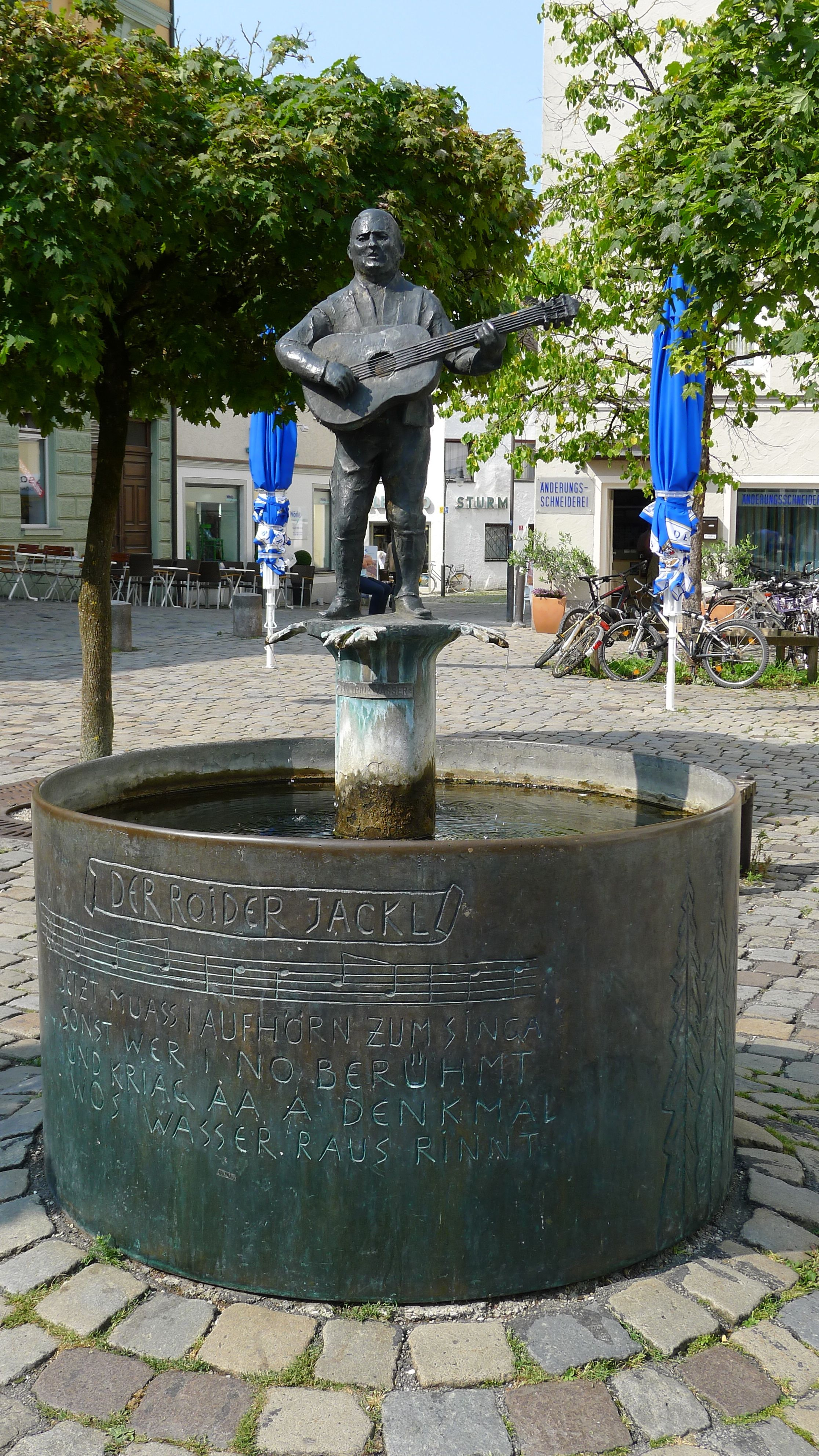 Brunnen in der Freisinger Altstadt dem Volkssänger Roider Jackl gewidmet